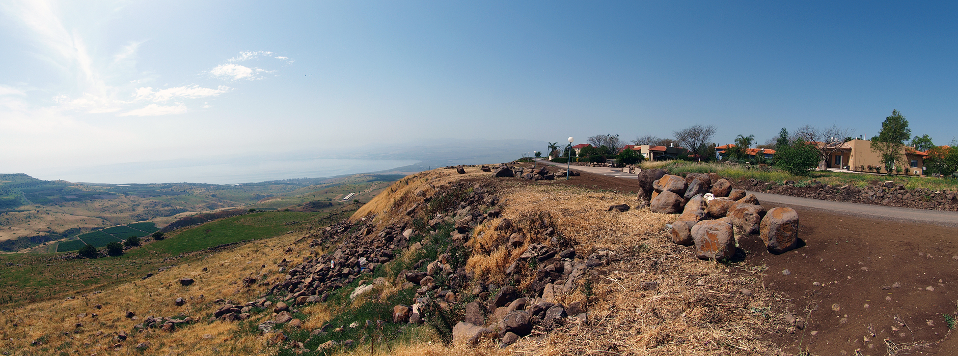 Вид от мошава Канаф в сторону озера Кинерет NOTE: This image is a panorama consisting of multiple frames that were merged in software. As a result, this image necessarily underwent some form of digital manipulation. These manipulations may include blending, blurring, cloning, and color and perspective adjustments. As a result of these adjustments, the image content may be slightly different than reality at the points where multiple images were combined. This manipulation is often required due to lens, perspective, and parallax distortions.